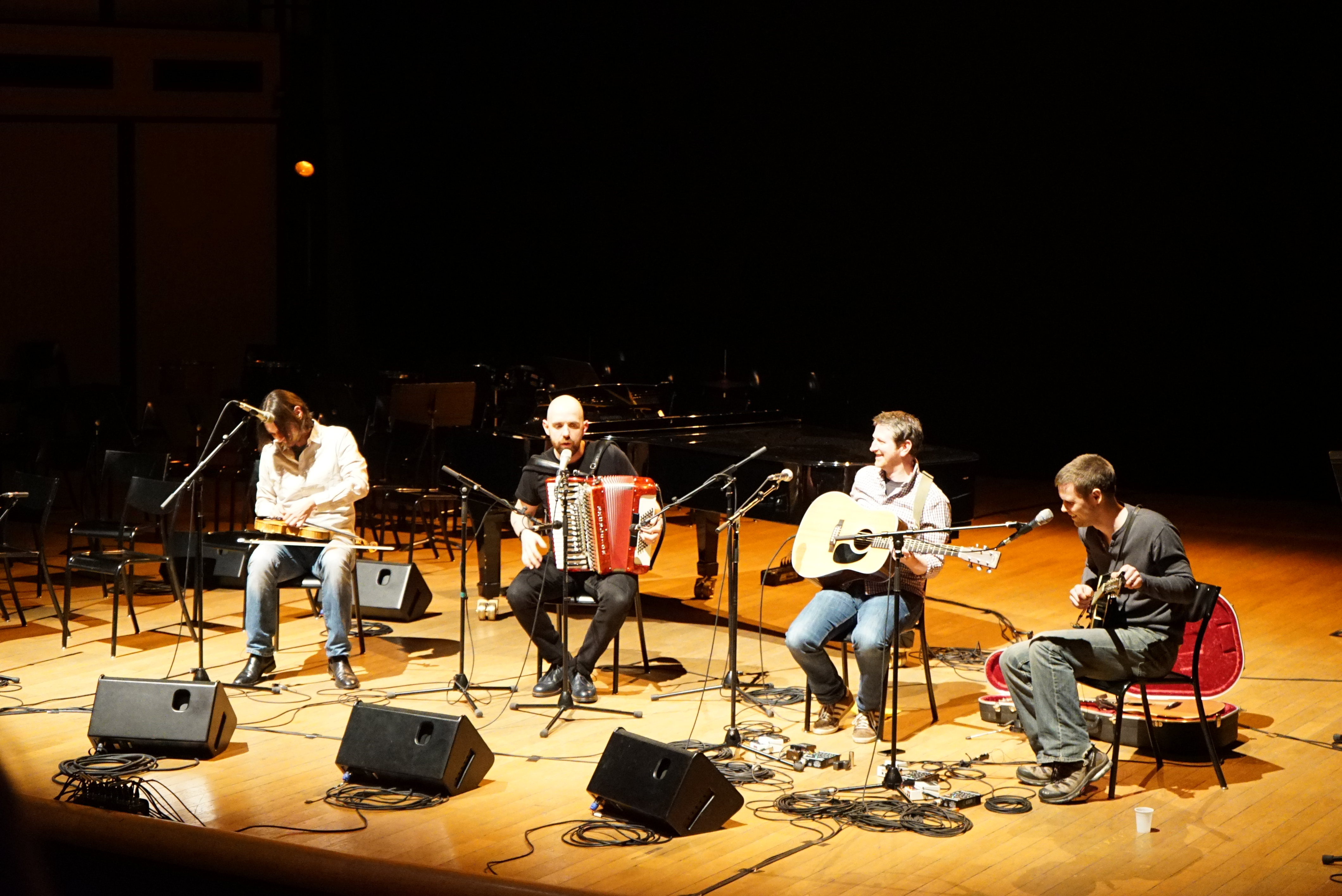 halton quartet en concert au conservatoire de Reims.